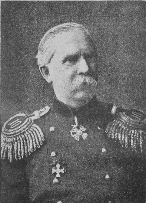 Данное изображение было использовано в статье «Веревкин, Владимир Николаевич» опубликованной в пятом томе «Военной энциклопедии», который был издан книгоиздательским товариществом Ивана Дмитриевича Сытина в 1911 году в столице Российской империи городе Санкт-Петербурге.